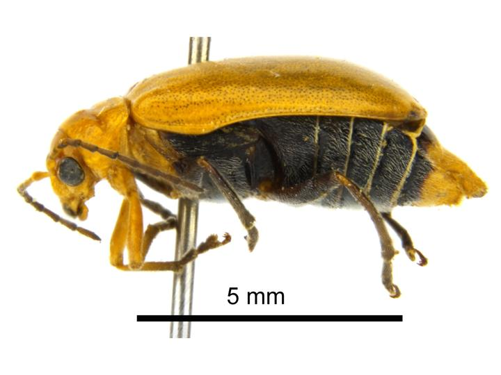 Aulacophora indica.